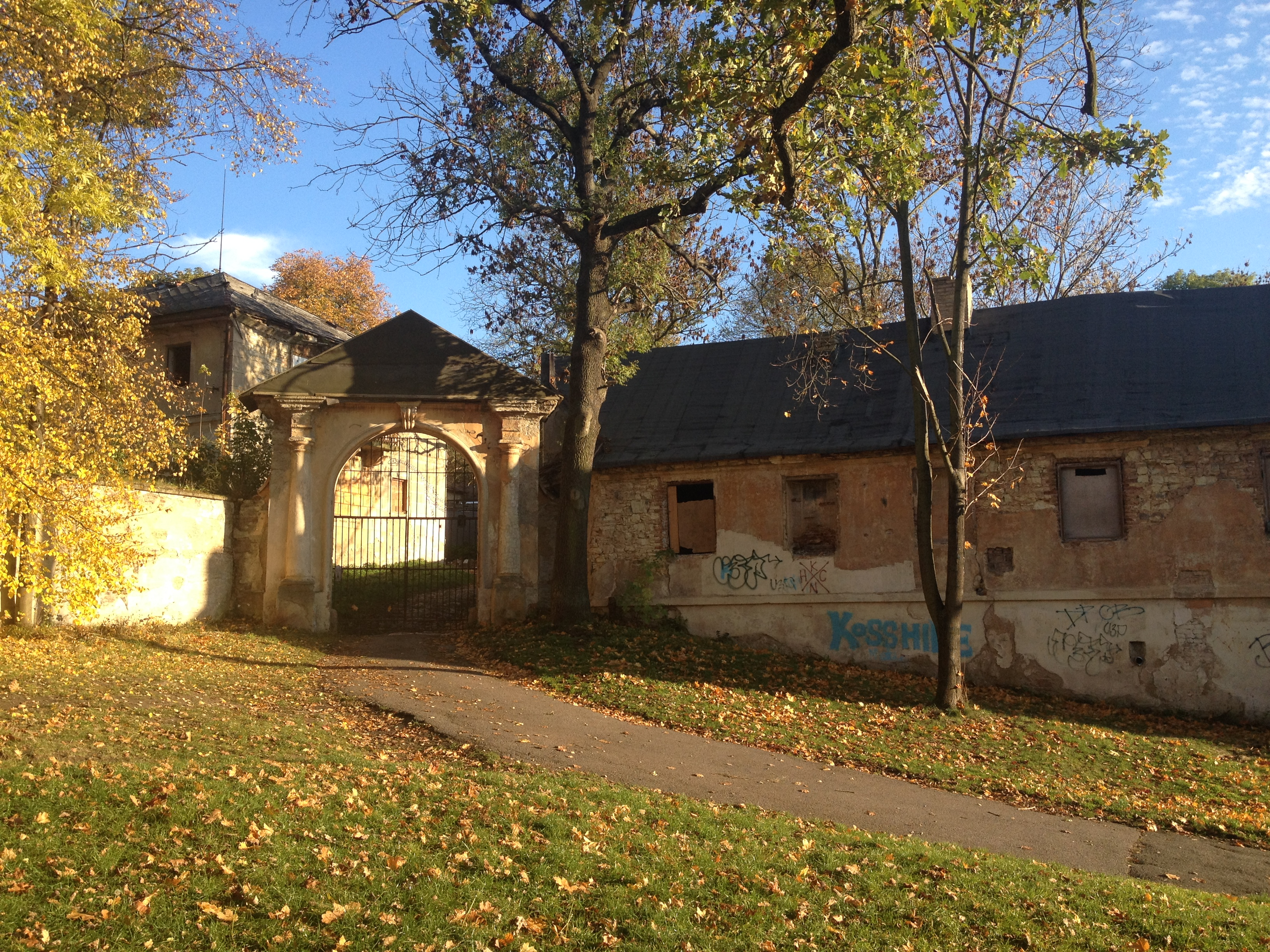 Usedlost Cibulka